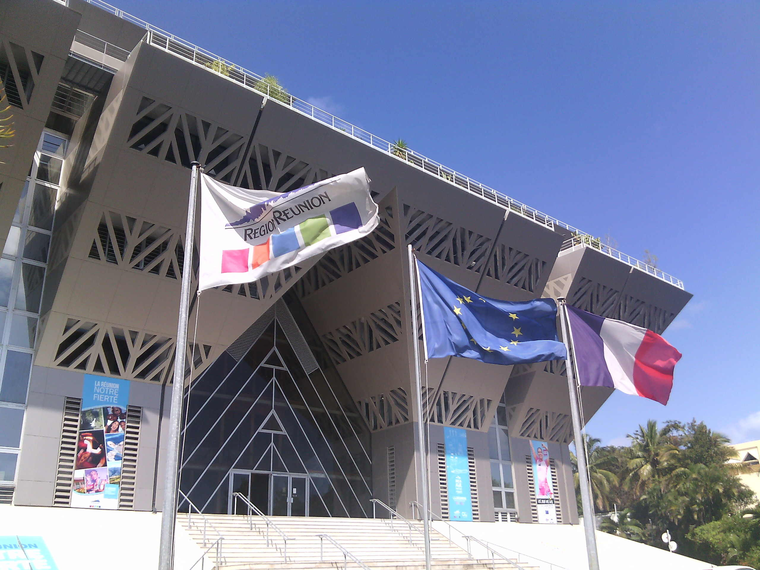 Un vent de démocratie souffle sur la Région Réunion